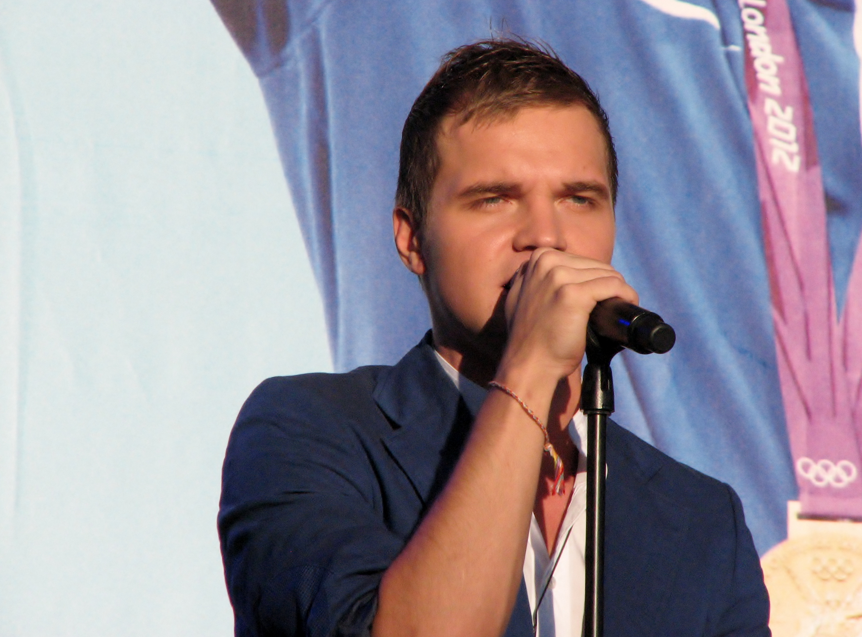 Ott Lepland laulmas Londoni olümpiamedalistide tervituspeol